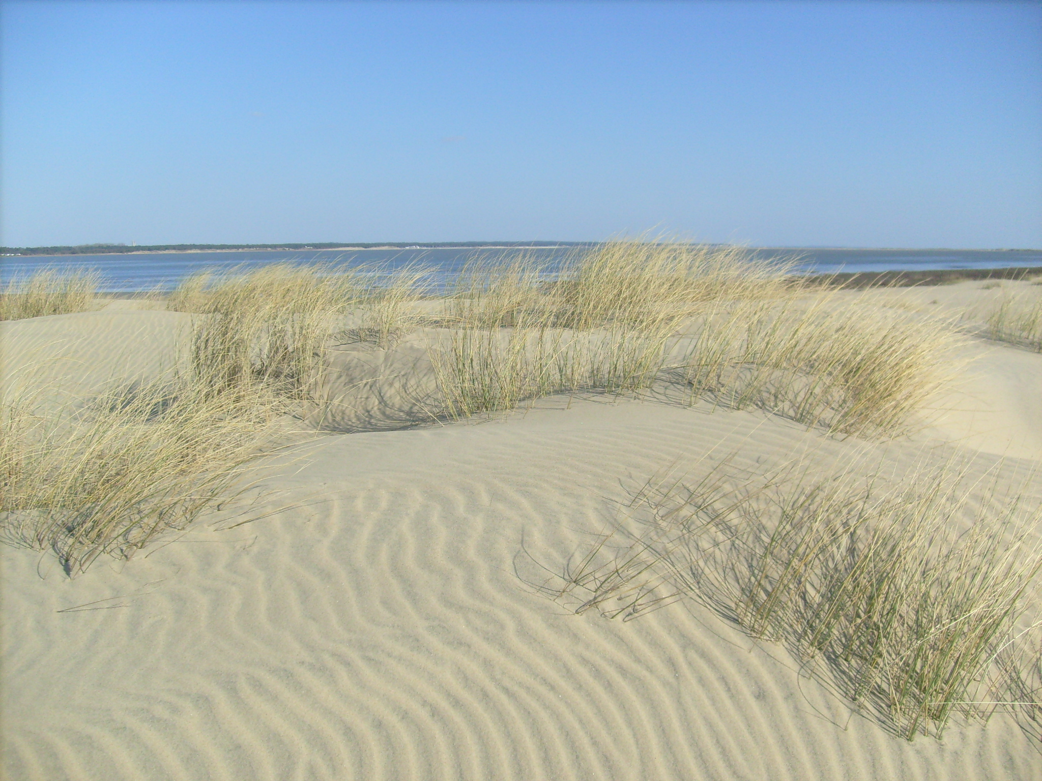 Dunes à la pointe de la Coubre (Charente-Maritime)